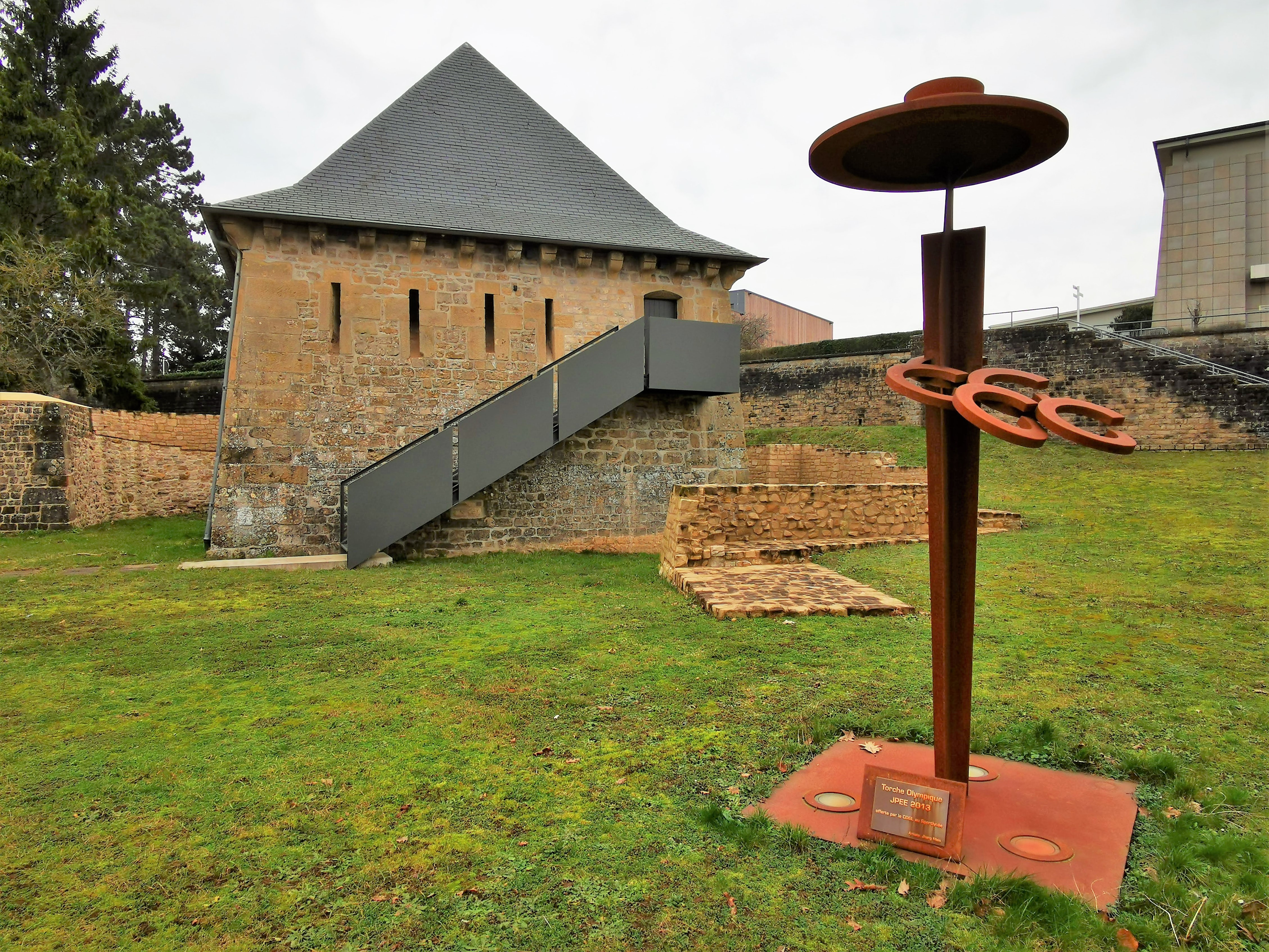 Luxembourg Fetschenhof. Le réduit du Fort Rubamprez restauré; en avant-plan la "Torche olympique", oeuvre de Jhang Meis offerte par le COSL au Sportlycée.